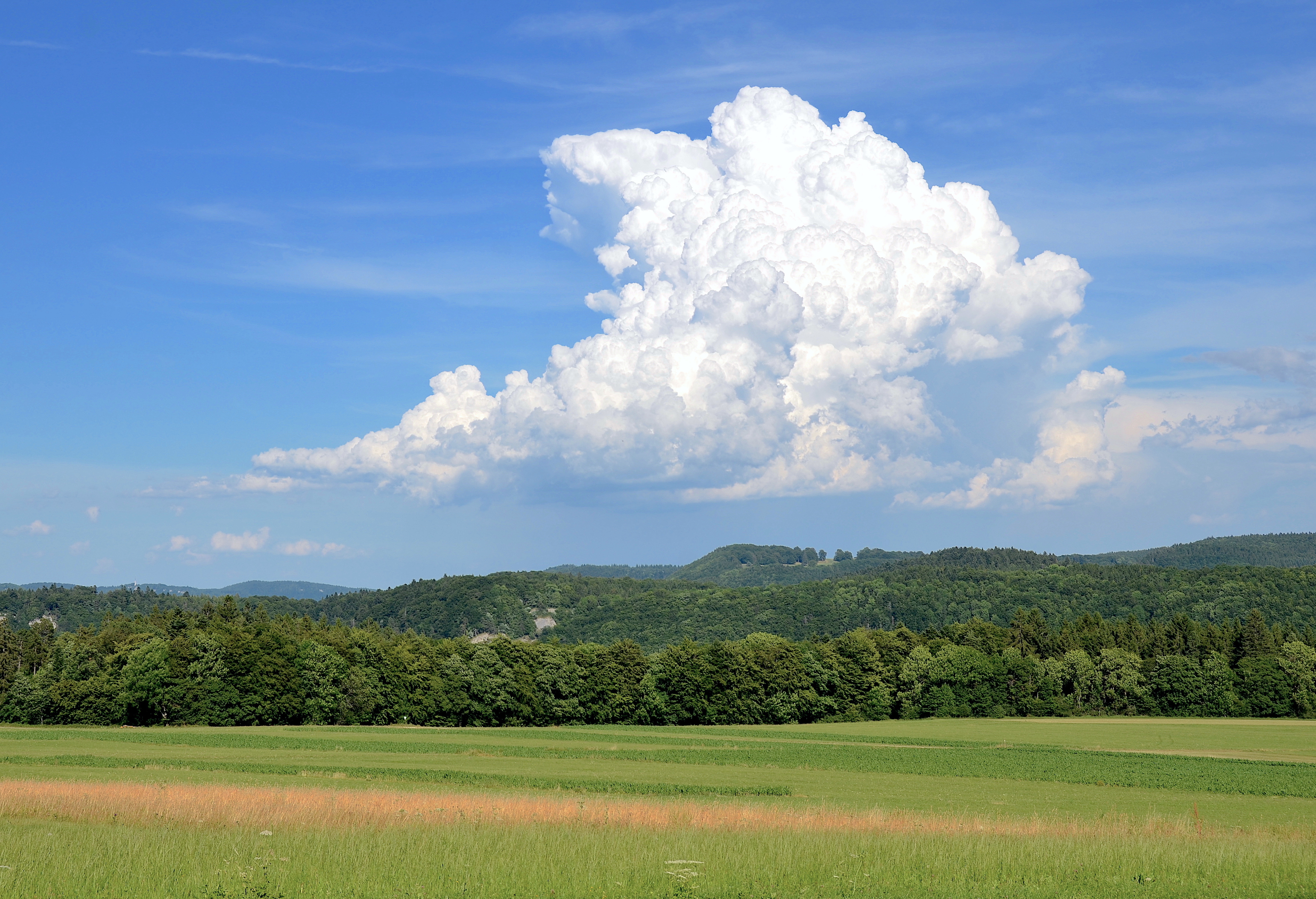 Cumuluswolke, Schwäbische Alb